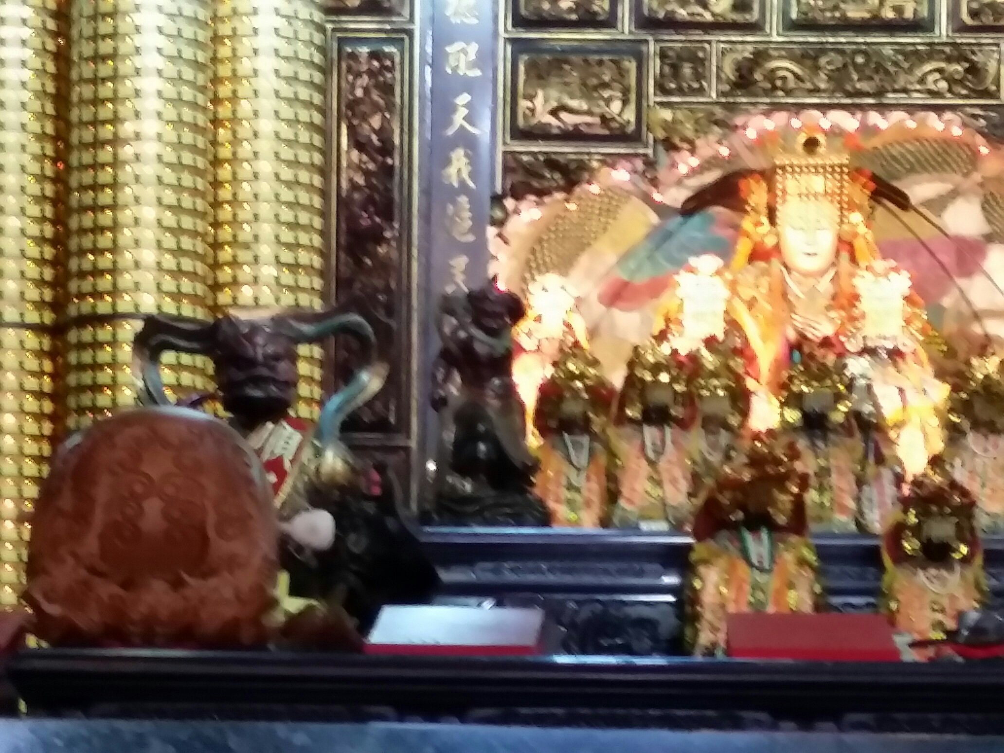 淡水福祐宮主神